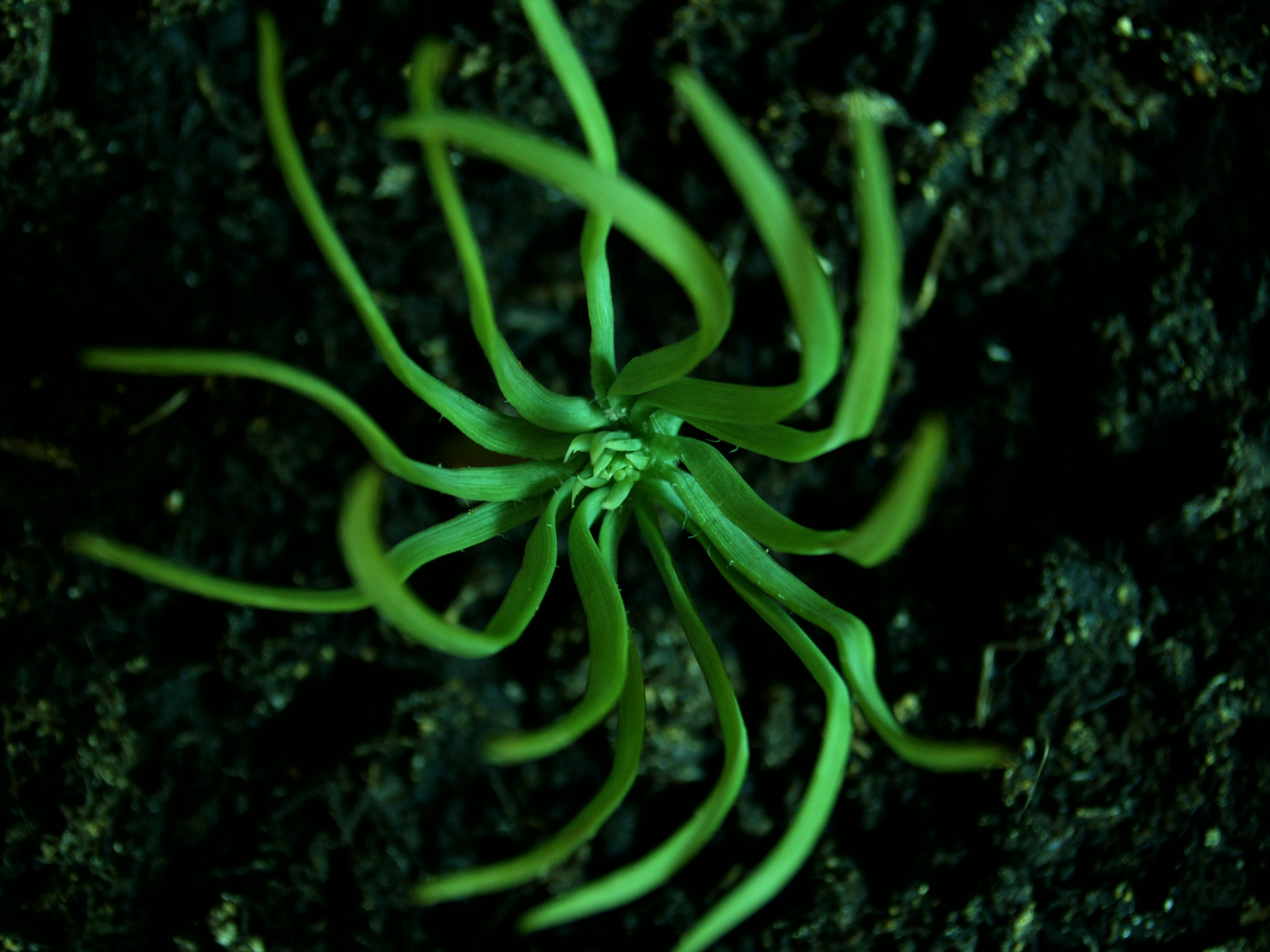 5 day old Pinus pinea. Fuenf Tage alte Pinie. Hjálmfura, fimm daga gamalla.